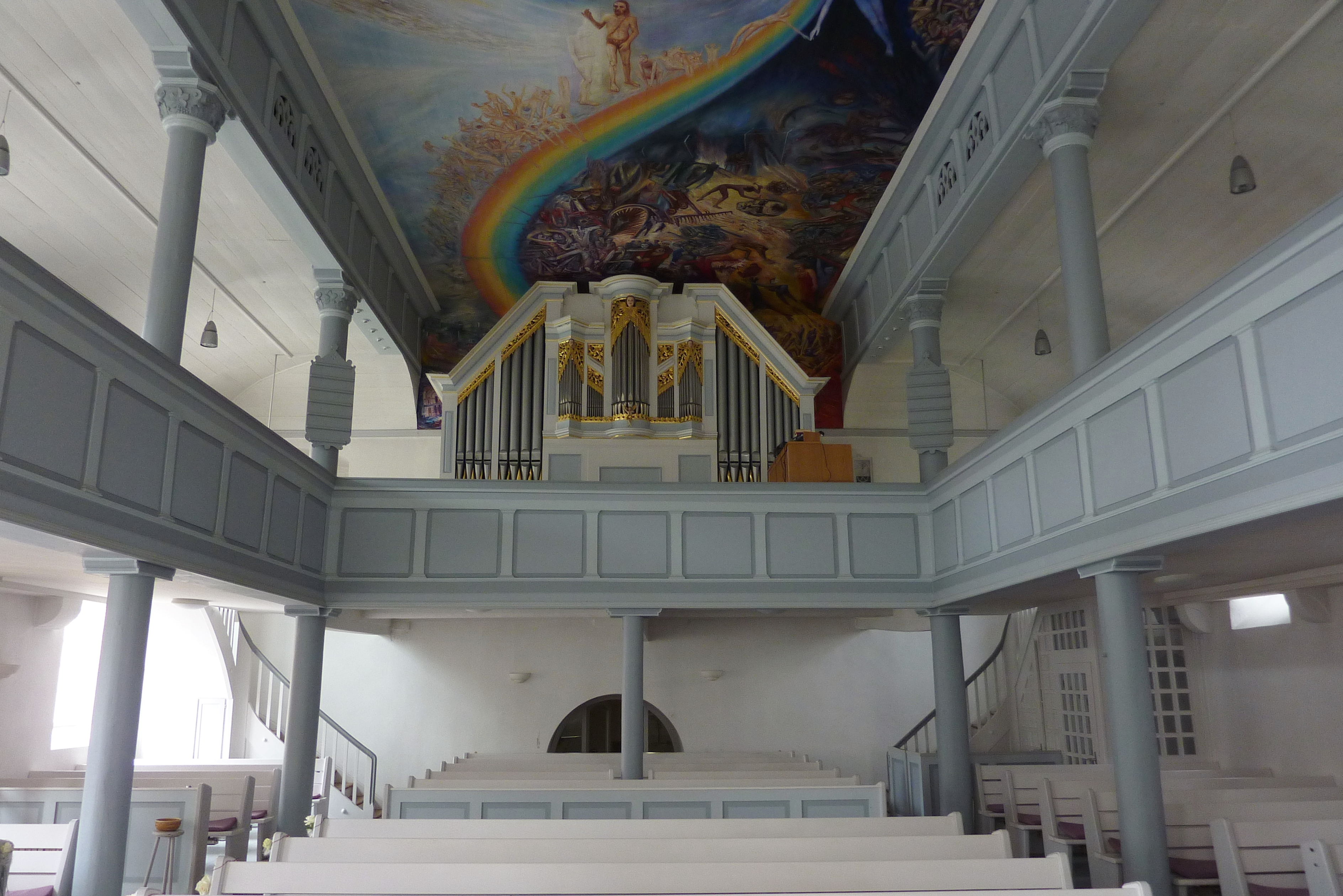 Evangelische Pfarrkirche von Reichensachsen, einem Ortsteil von Wehretal im Werra-Meißner-Kreis (Hessen), Emporen um 1900